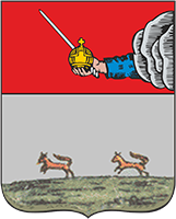 Герб города Яренска (ныне - село), Архангельская область